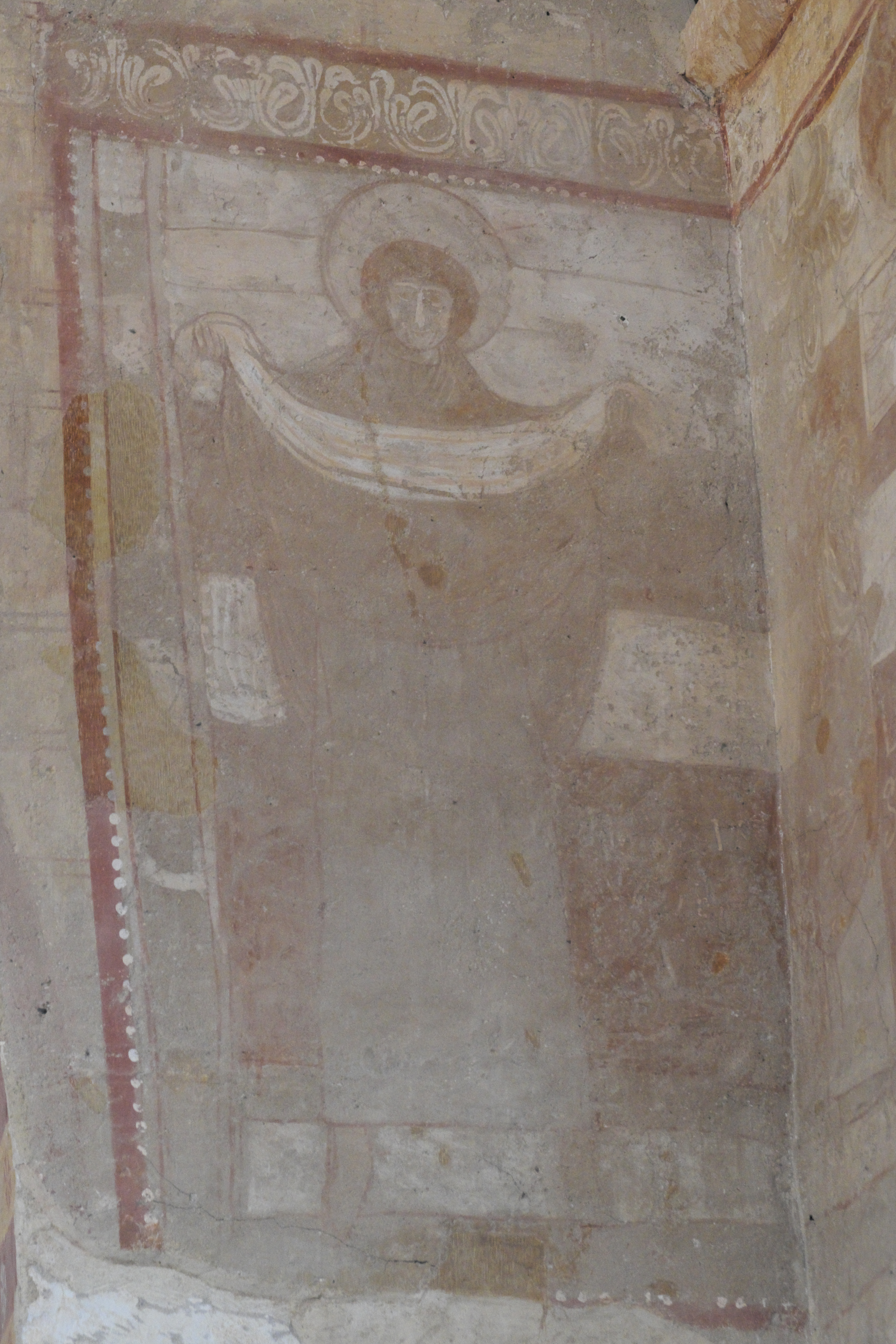 Kirche von Saint-Pierre-les-Églises in Chauvigny im Département Vienne (Nouvelle-Aquitaine/Frankreich), Wandmalereien